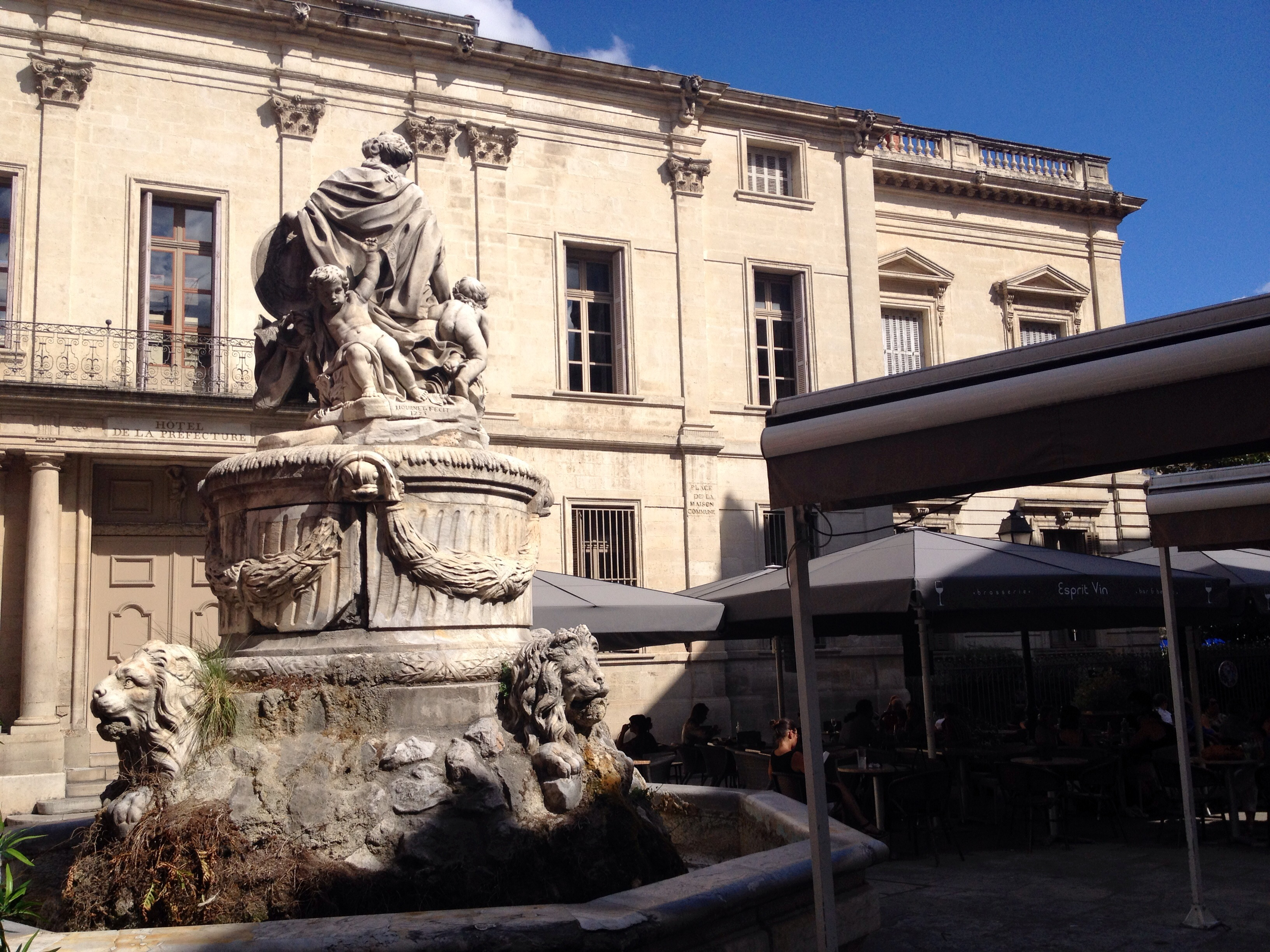 (MONTPELLIER,FR84)